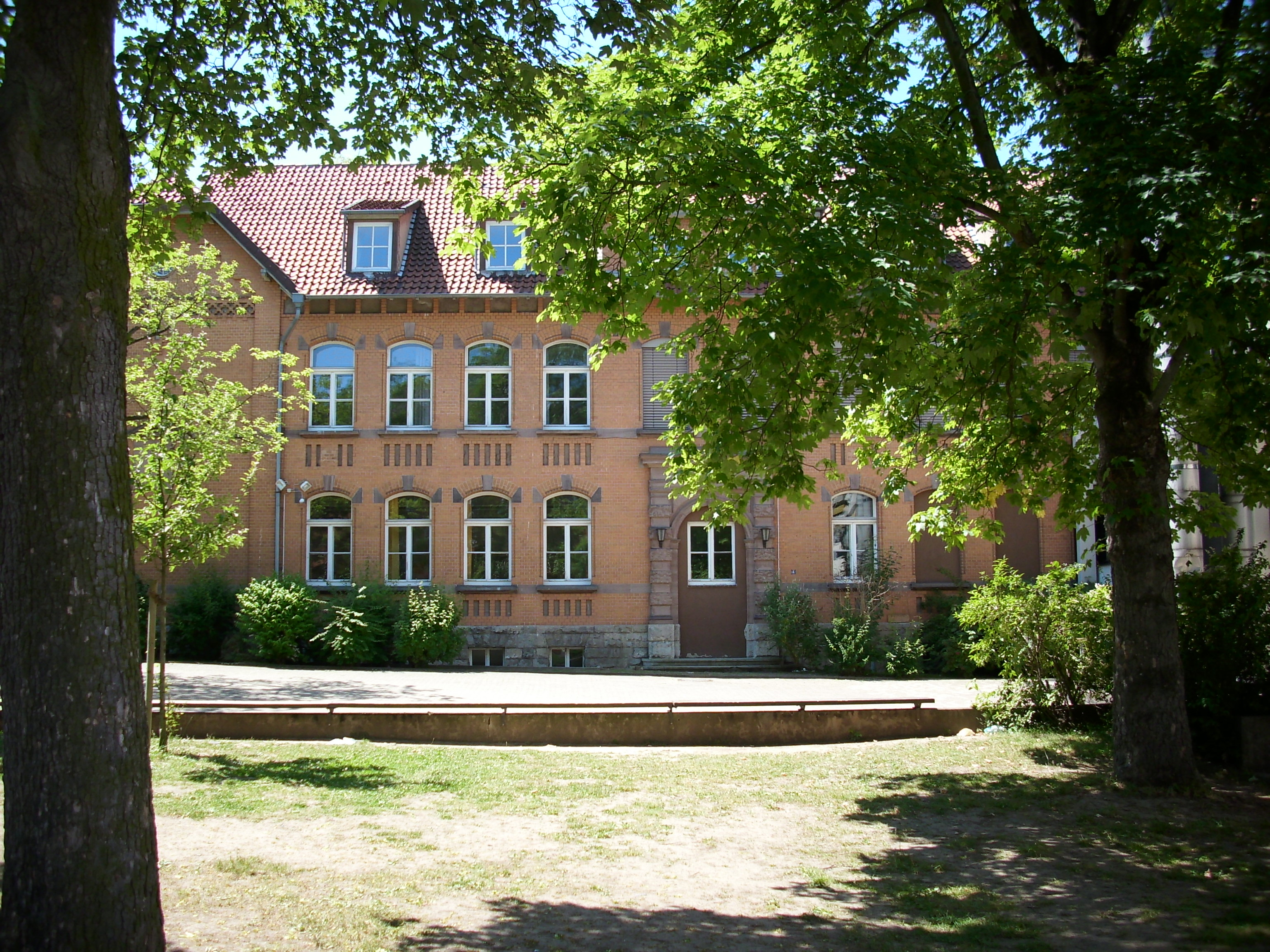 Die ehemalige katholische Kardinal-Bertram-Schule, heute ein Gebäudeteil des Gymnasium Corvinianum. Der Abriss des Gebäudes soll 2012 vollzogen werden.